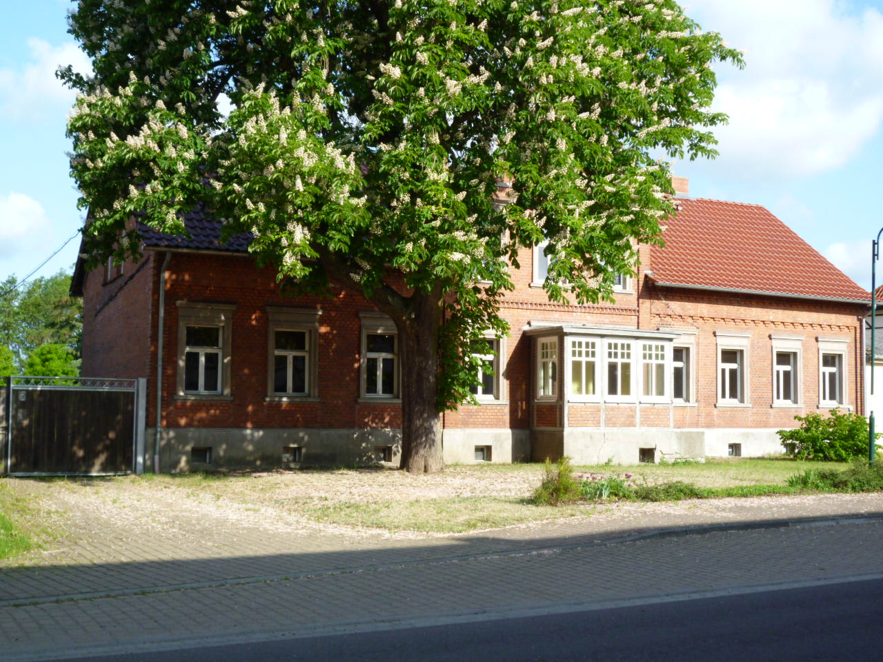 Calvörde-Lössewitz, 17.05.2012, denkmalgeschütztes Haus, Dorfstraße 5, Bild II